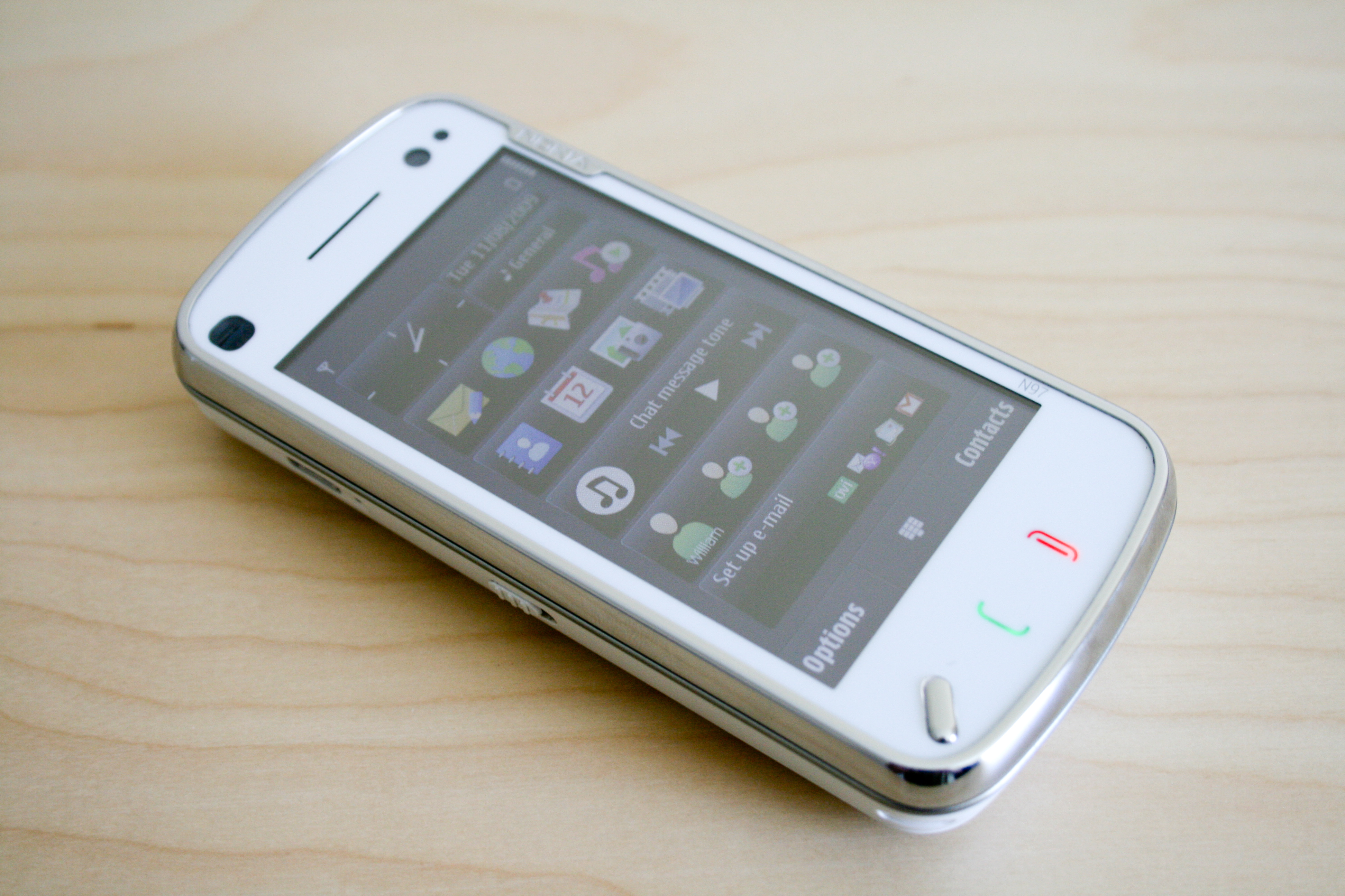 Smartfon English | polski | +/−